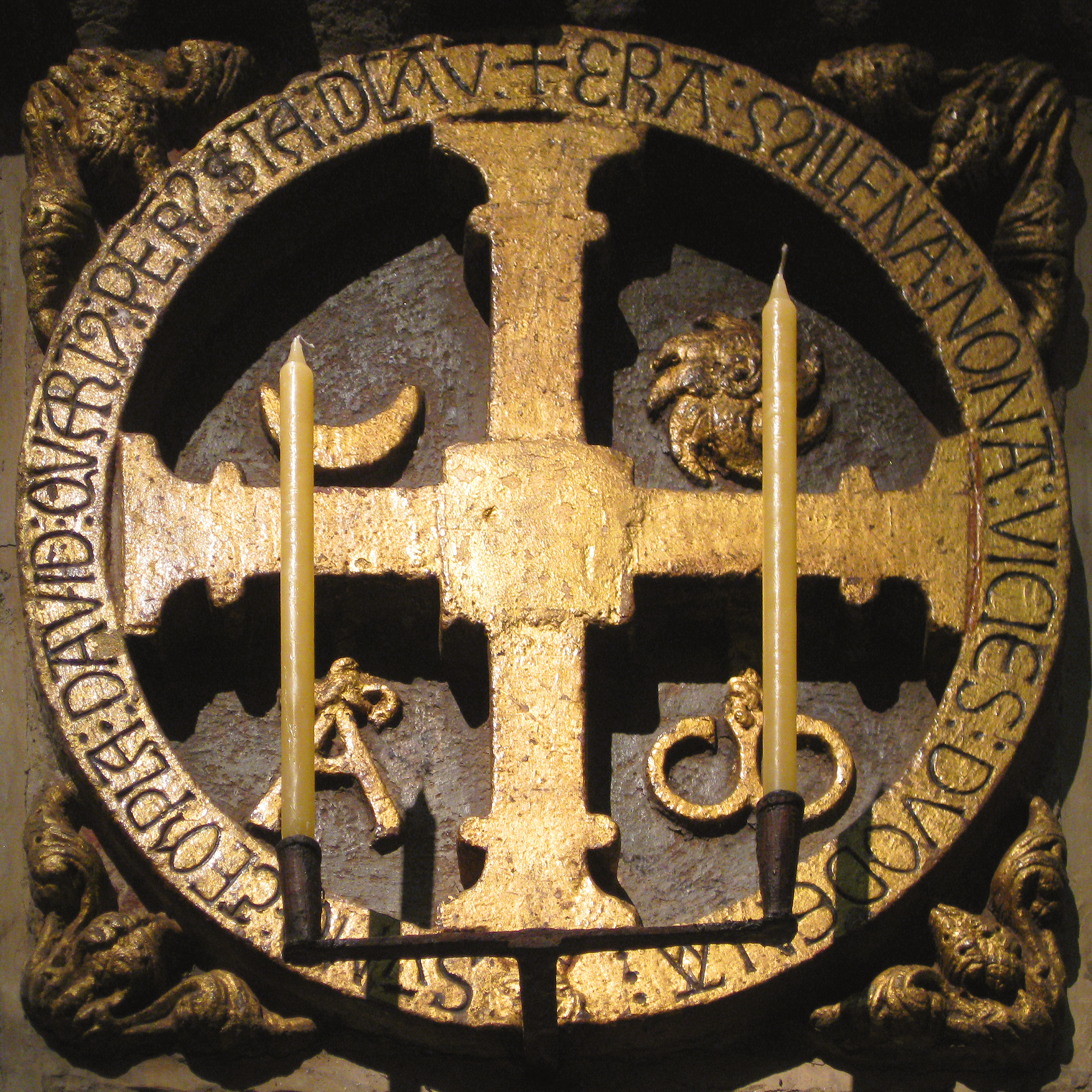 Cruz de consagración en la Catedral de Santiago de Compostela. Dístico: "era millena nona vicies dvodena Svmmo templa David quartvs Petrvs ista dicavit"